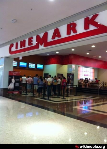 Vista lateral do Cinemark Park Shopping São Caetano do Sul